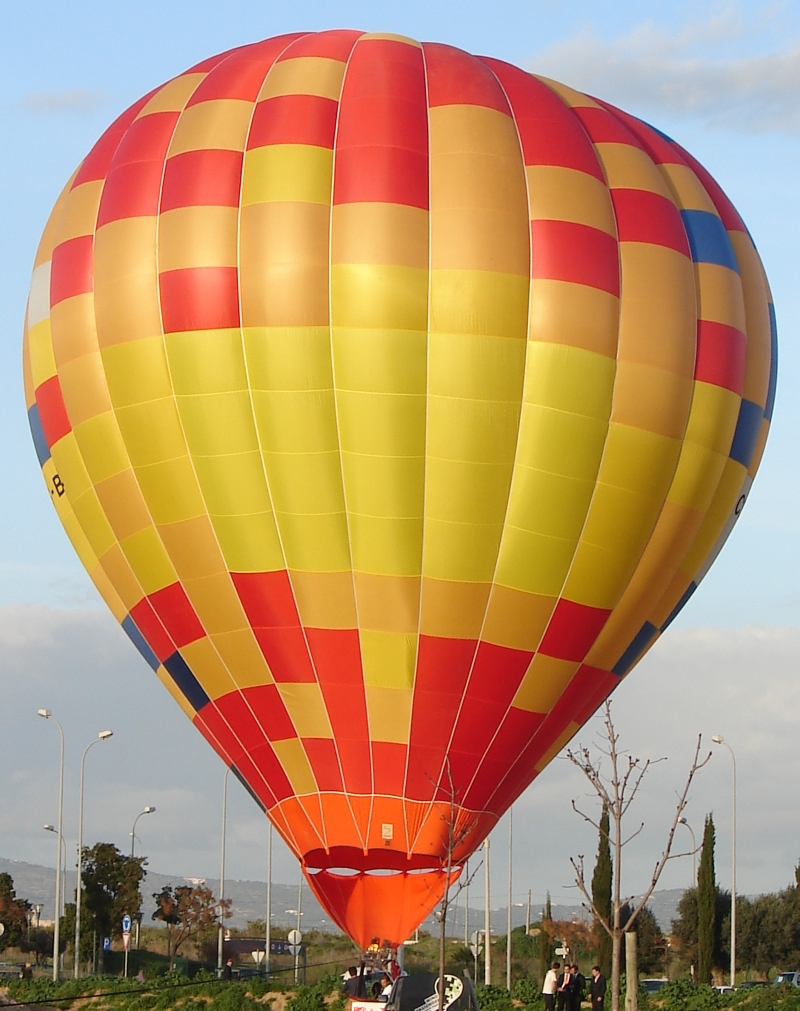 Balão de ar quente Author: Valter Jacinto